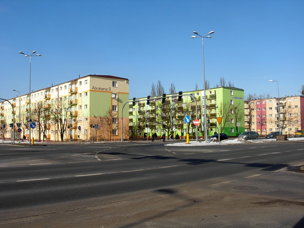 Zabudowa na osiedlu Błonie w Bydgoszczy